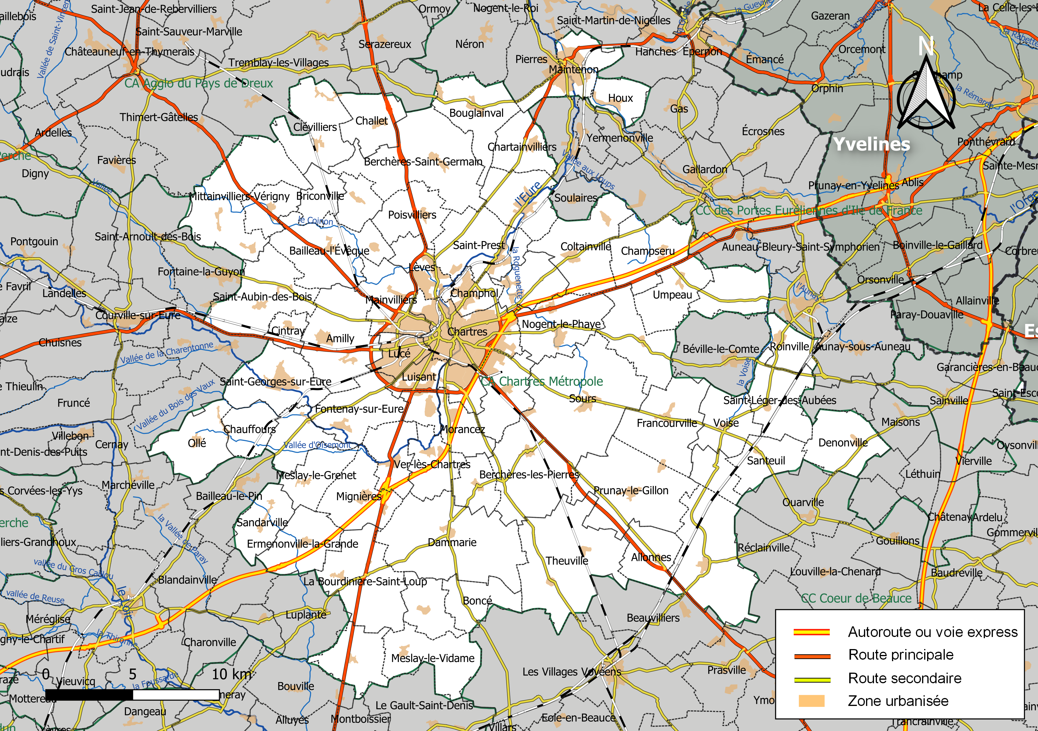 Carte géographique de la communauté d'agglomération Chartres métropole, département d'Eure-et-Loir, France. Composition au 1er janvier 2019.